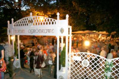 Konkurs Teatrów Ogródkowych - Ogrody Frascatii 2006